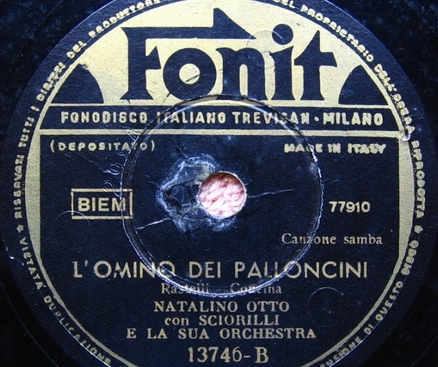 Uno dei numerosi dischi a 78 giri incisi da Natalino Otto per la casa Fonit.